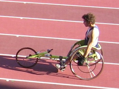 Esa-Pekka Mattila Kalevan kisoissa, Ratinan stadionilla, Tampereella, 26. heinäkuuta 2008